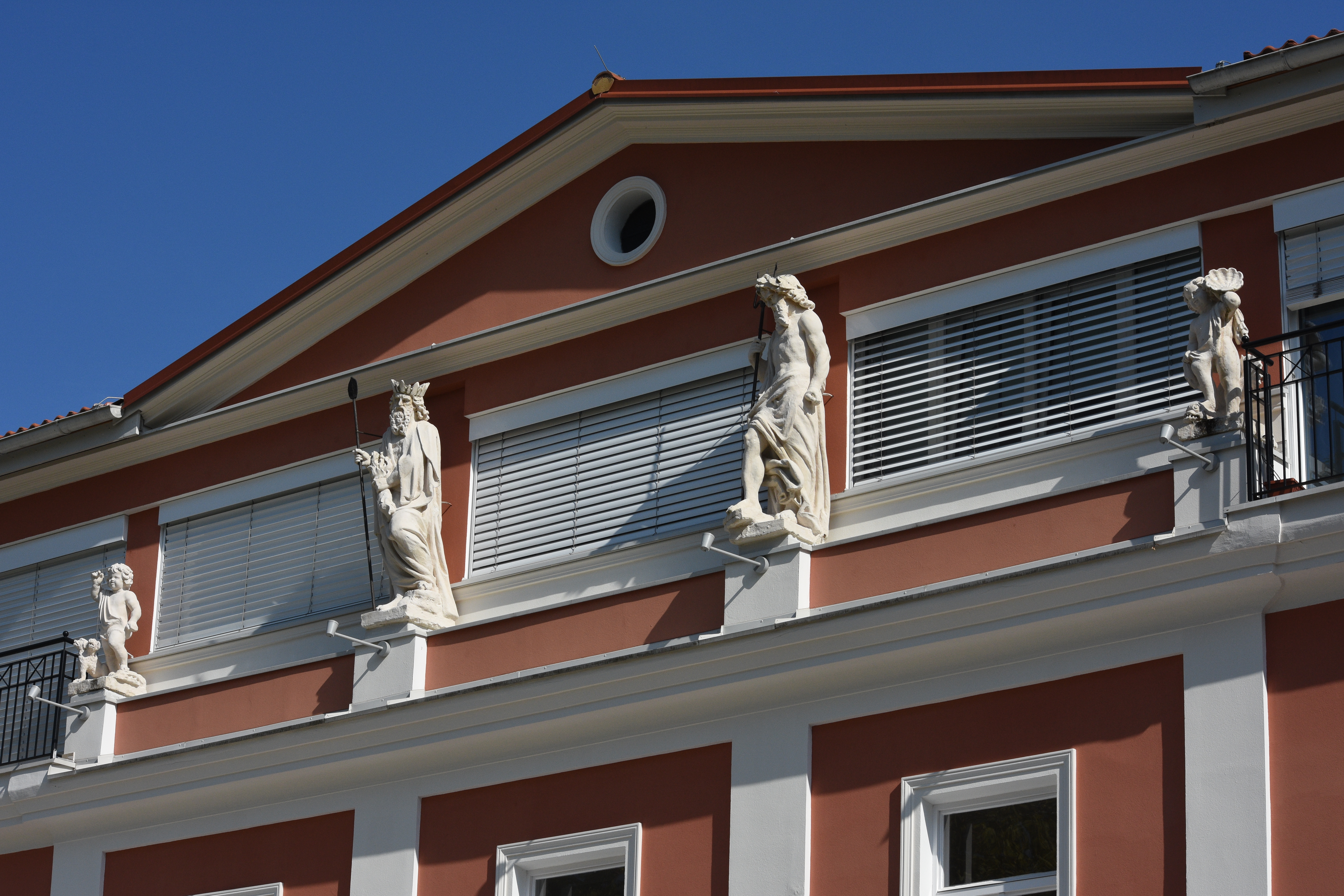 Terrassengebäude Bad Gleichenberg Detail